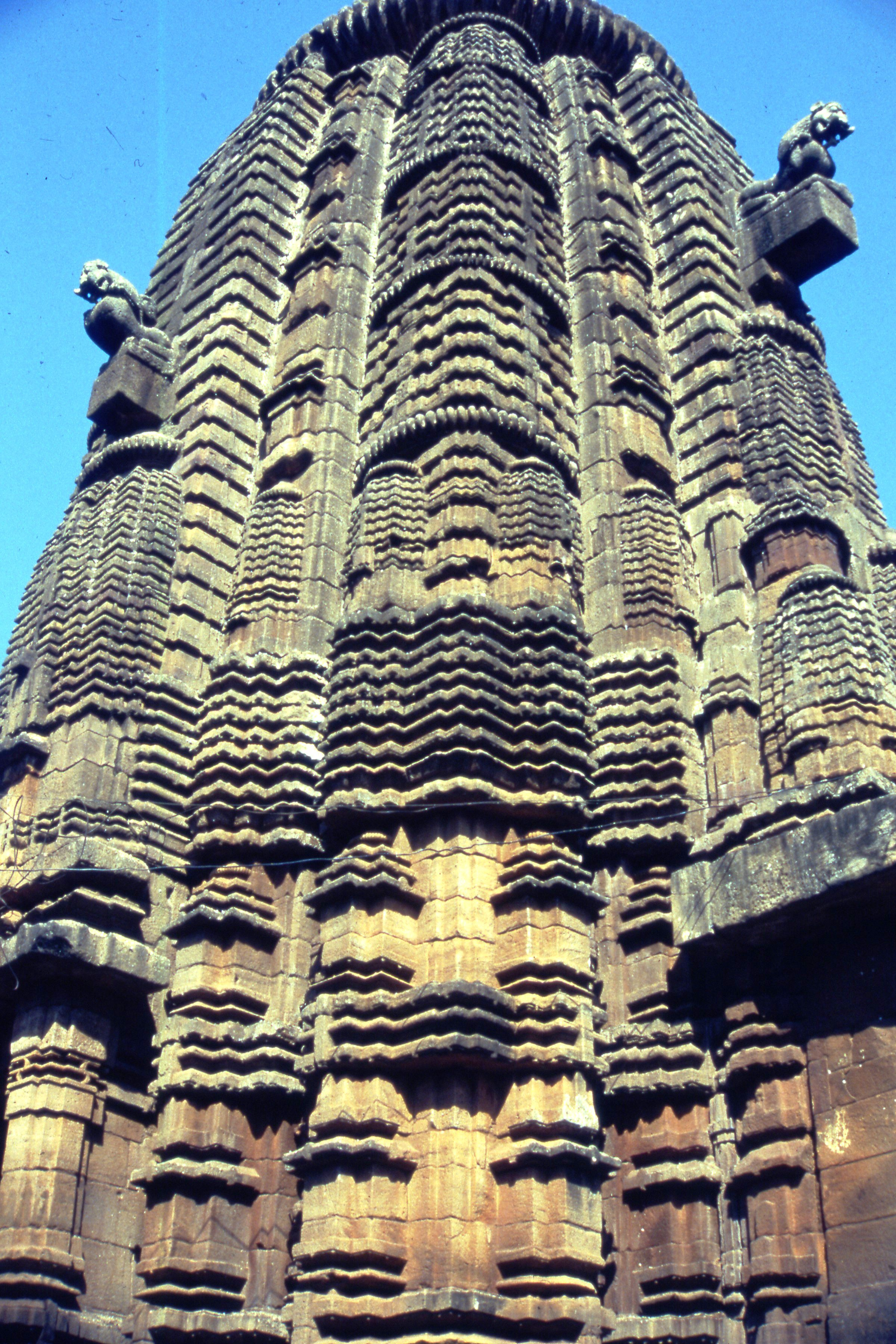 Vista en contrapicado de una Sikhara, estructura arquitectonica común en los templos del norte de la India. Bhuvanesvar, India.